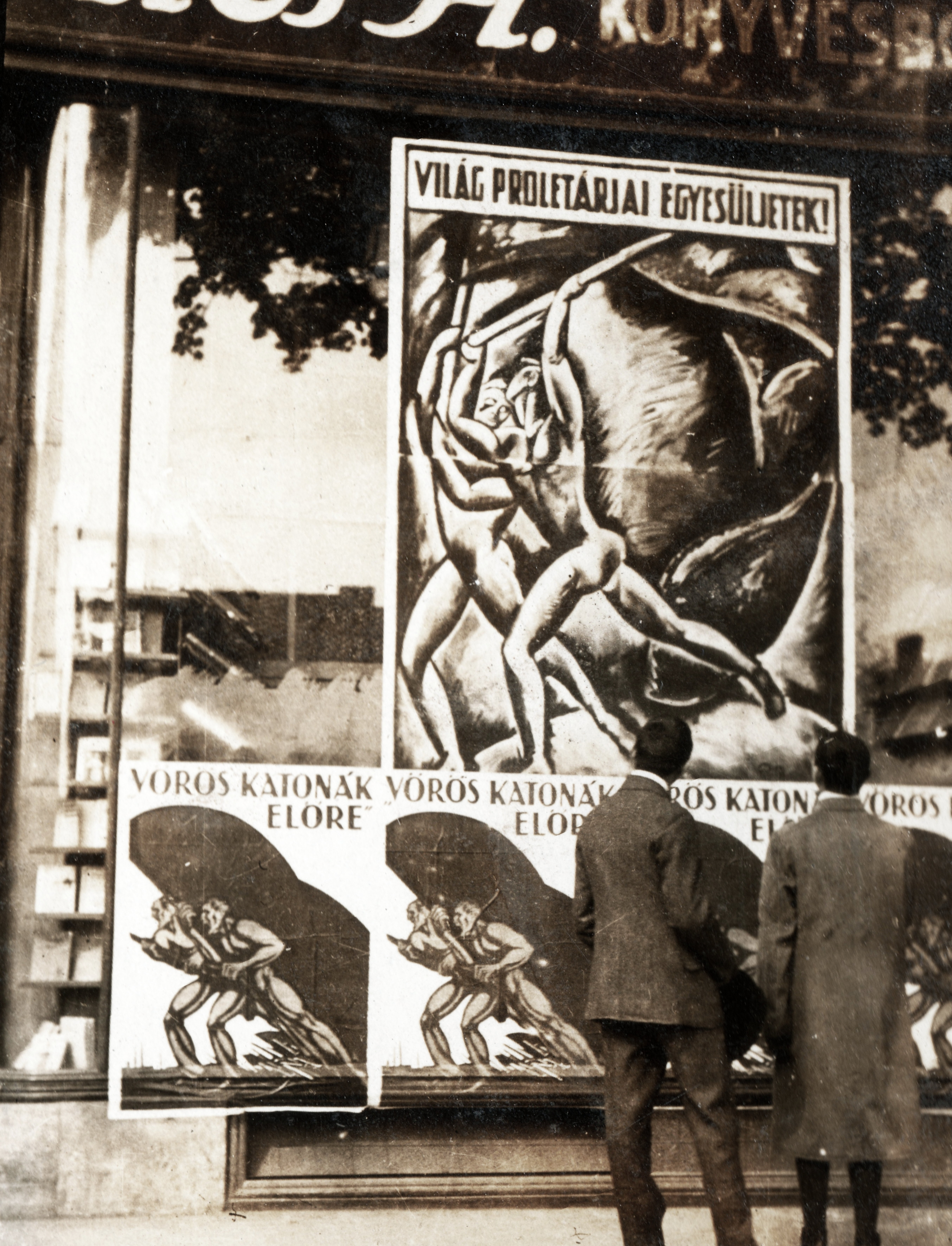 JELMONDAT, TANÁCSKÖZTÁRSASÁGI PLAKÁT, PÓR BERTALAN-GRAFIKA, SEIDNER PLAKÁTGYÁR ,TÁBOR JÁNOS-GRAFIKA, KUNOSSY LITHOGRÁFIAI MŰINTÉZET